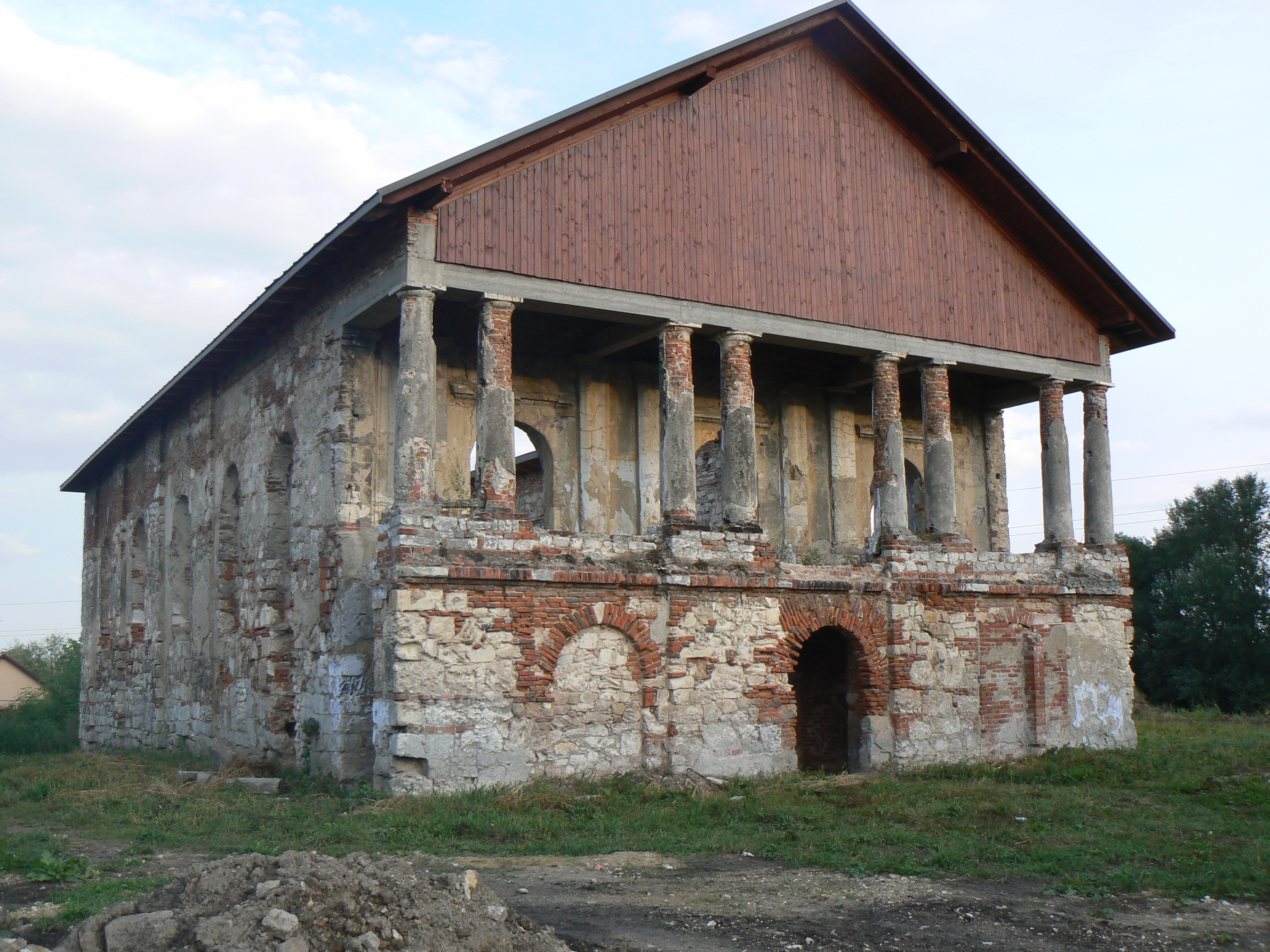 Synagoga w Nowym Korczynie